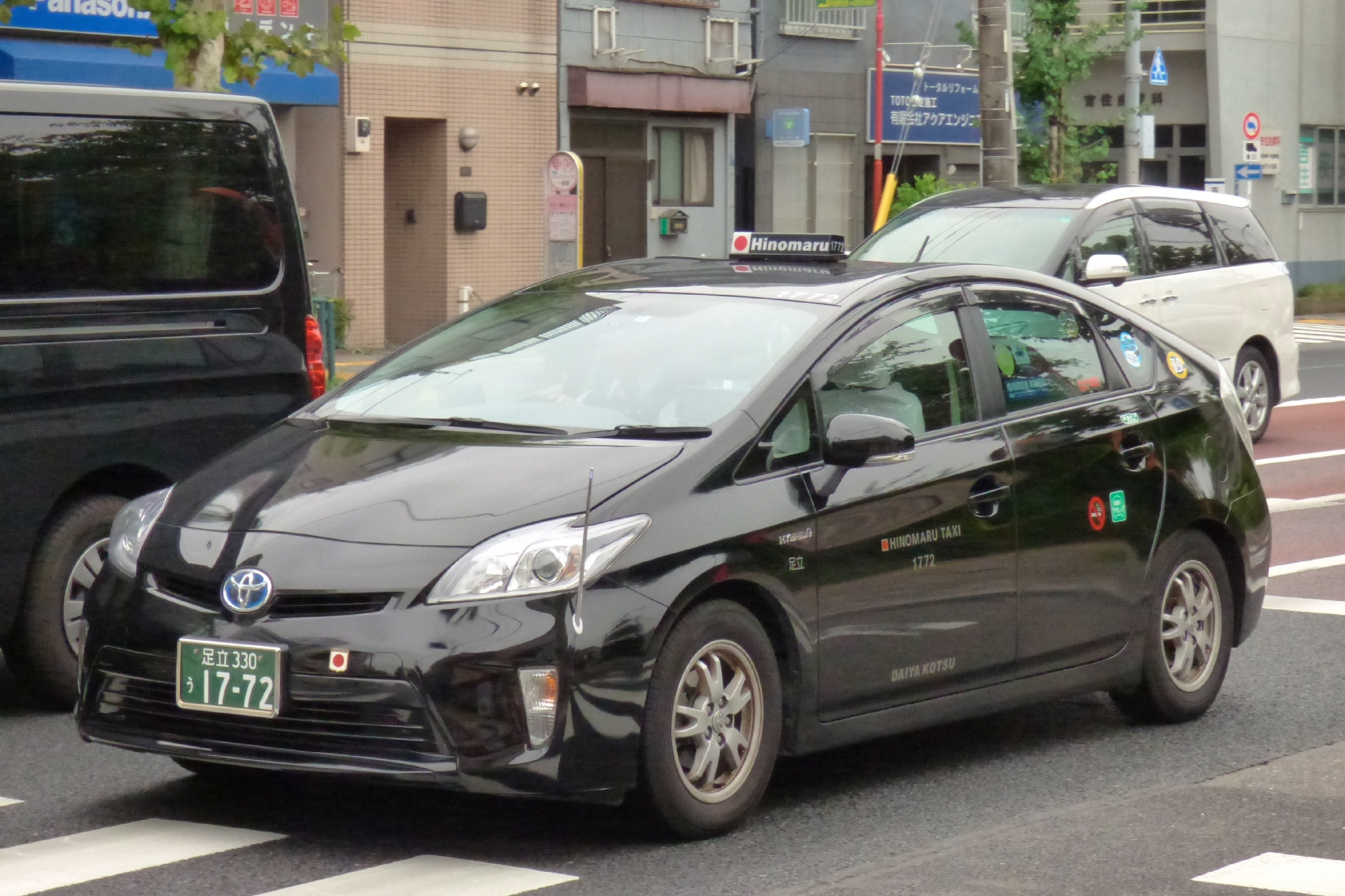 ダイヤ交通のトヨタ・プリウス